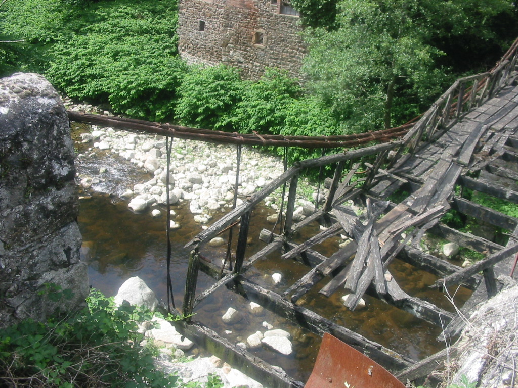 tablier du pont de moulin sur cance